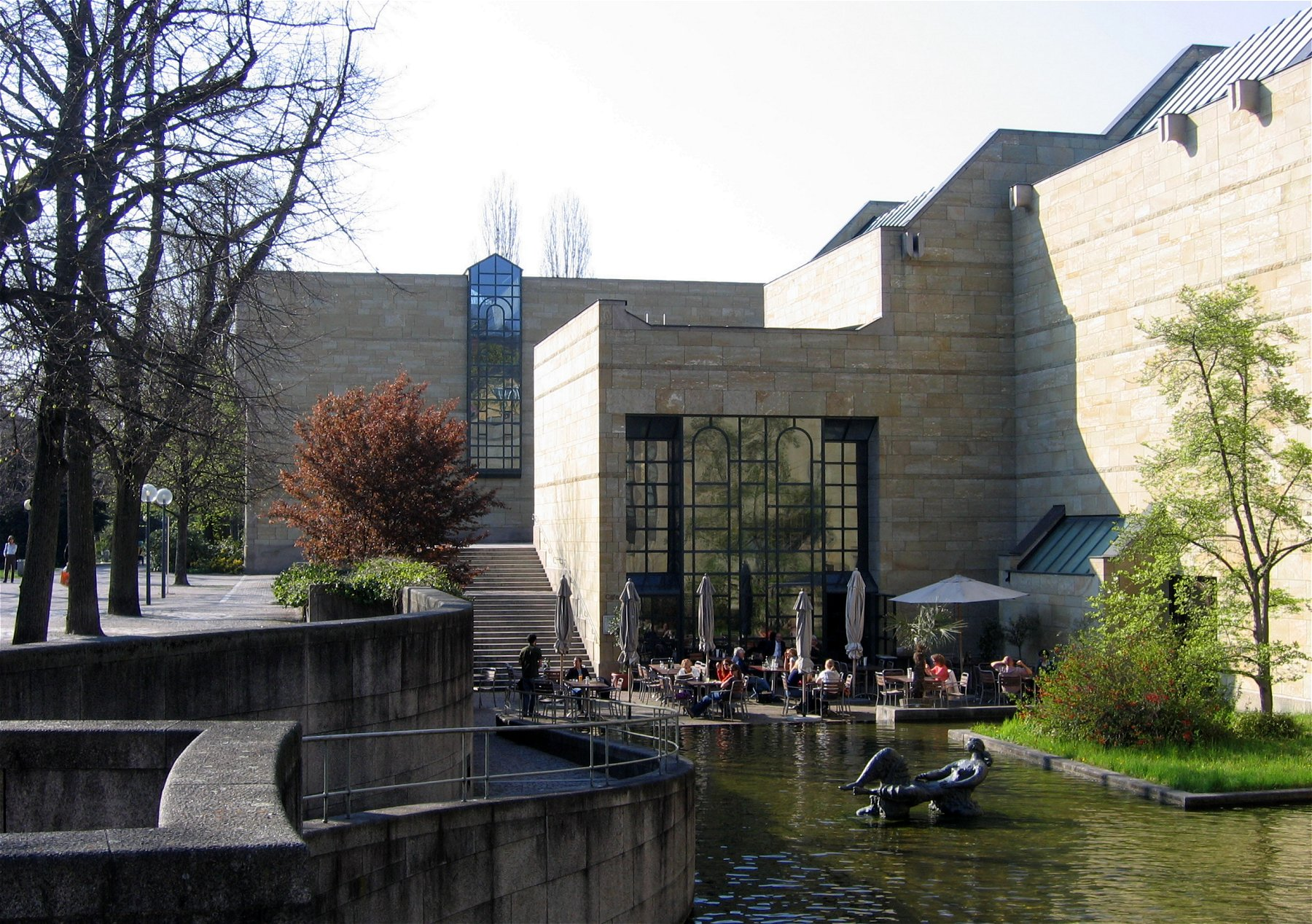 Neue Pinakothek Muenchen